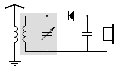 Einfachste Schaltung eines Einkreisers. Der einzige Schwingkreis ist grau hinterlegt.